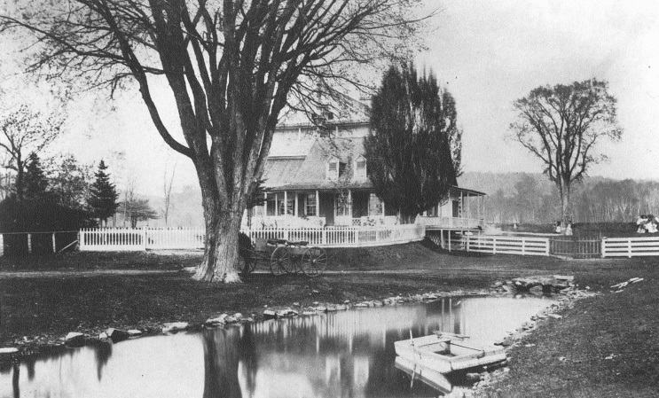 Manoir Montarville Vers 1890, 19e siècle Sels d'argent sur papier monté sur carton - Papier albuminé 15 x 20 cm